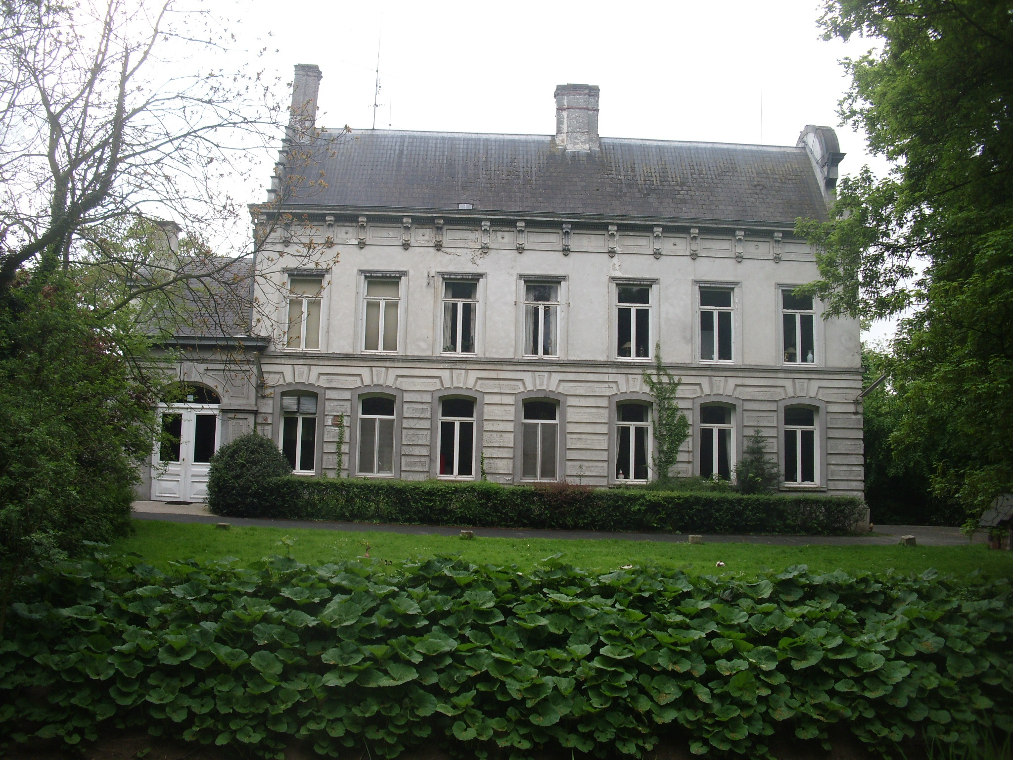 Kasteel Ter Borcht - Baronielaan - Meulebeke - West-Vlaanderen - België